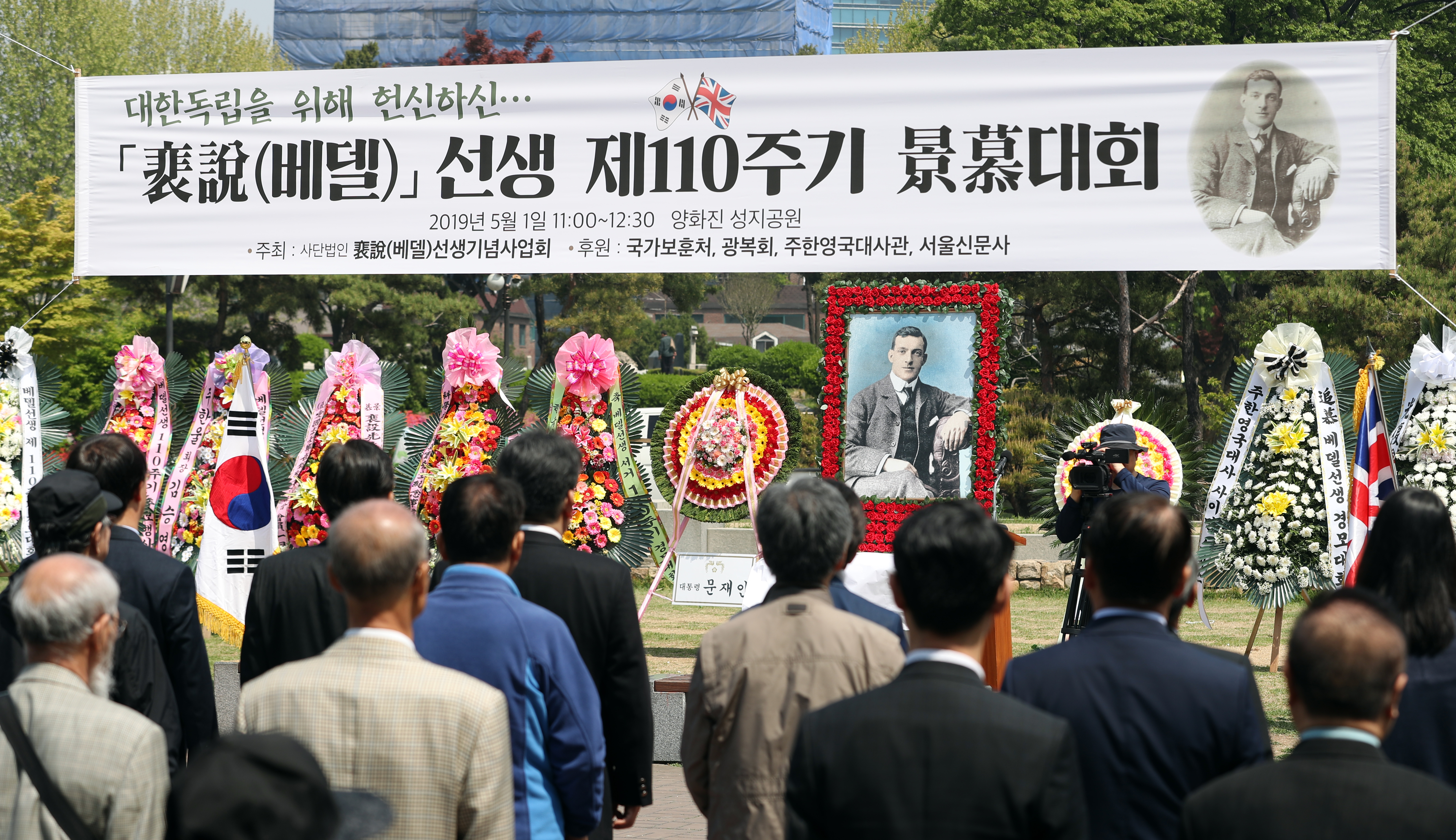 The 110th Years Honor Ceremony for Ernest Thomas Bethell May 1, 2019 Yanghwajin Foreign Missionary Cemetery, Mapo-gu, Seoul Ministry of Culture, Sports and Tourism Korean Culture and Information Service ( Official Photographer : Jeon Han This official Republic of Korea photograph is being made available only for publication by news organizations and/or for personal printing by the subject(s) of the photograph. The photograph may not be manipulated in any way. Also, it may not be used in any type of commercial, advertisement, product or promotion that in any way suggests approval or endorsement from the government of the Republic of Korea. 베델 선생 제110주기 경모대회 2019-05-01 양화진외국인선교사묘원 문화체육관광부 해외문화홍보원 코리아넷 전한